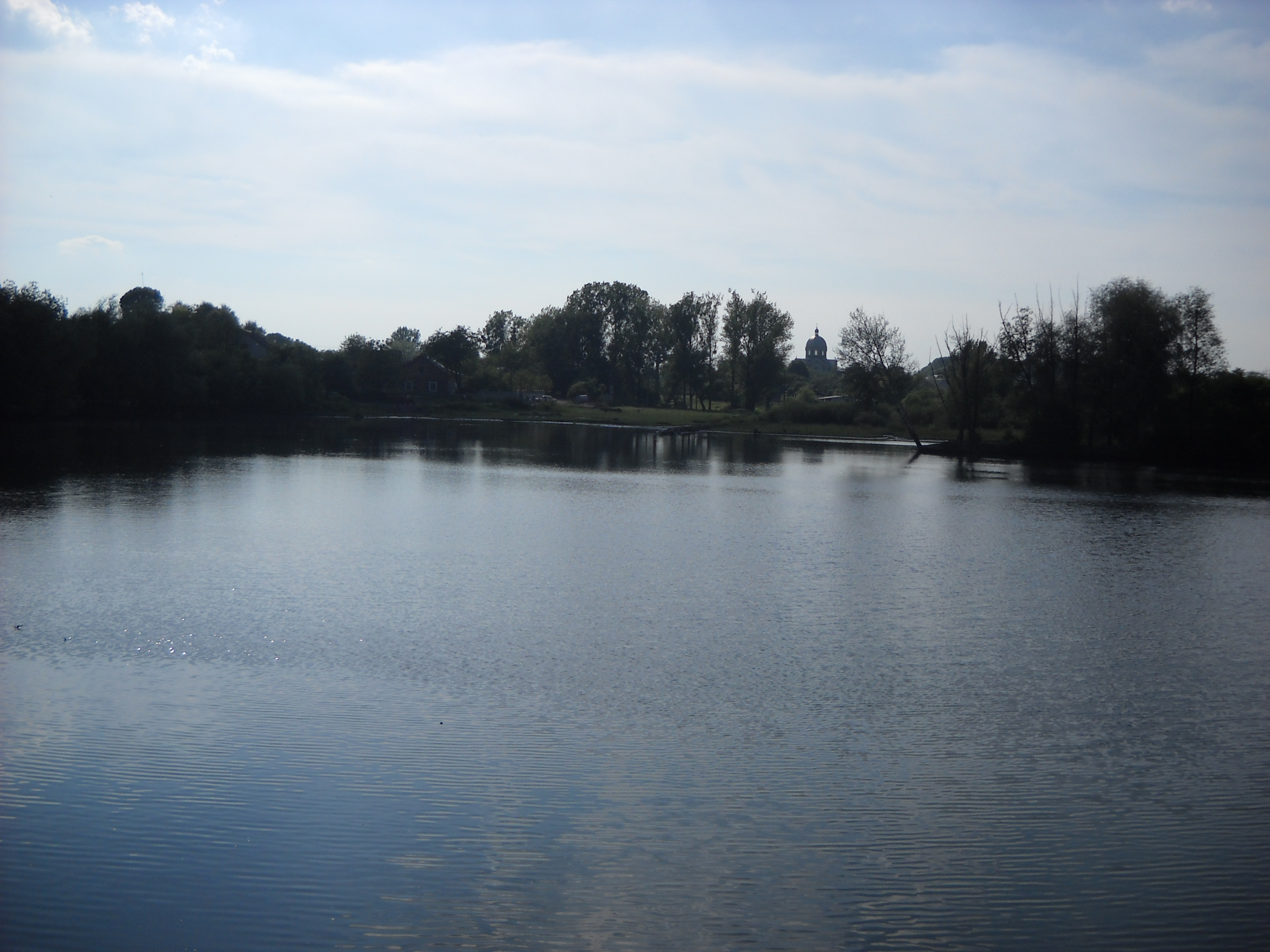 Ставок у селі Борятин.